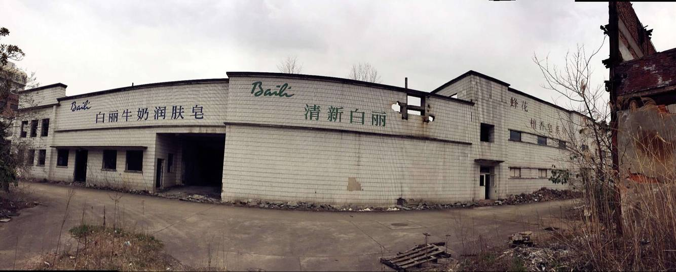 上海制皂有限公司工厂